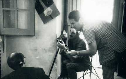 Image of Omar Parada in Tal vez mañana